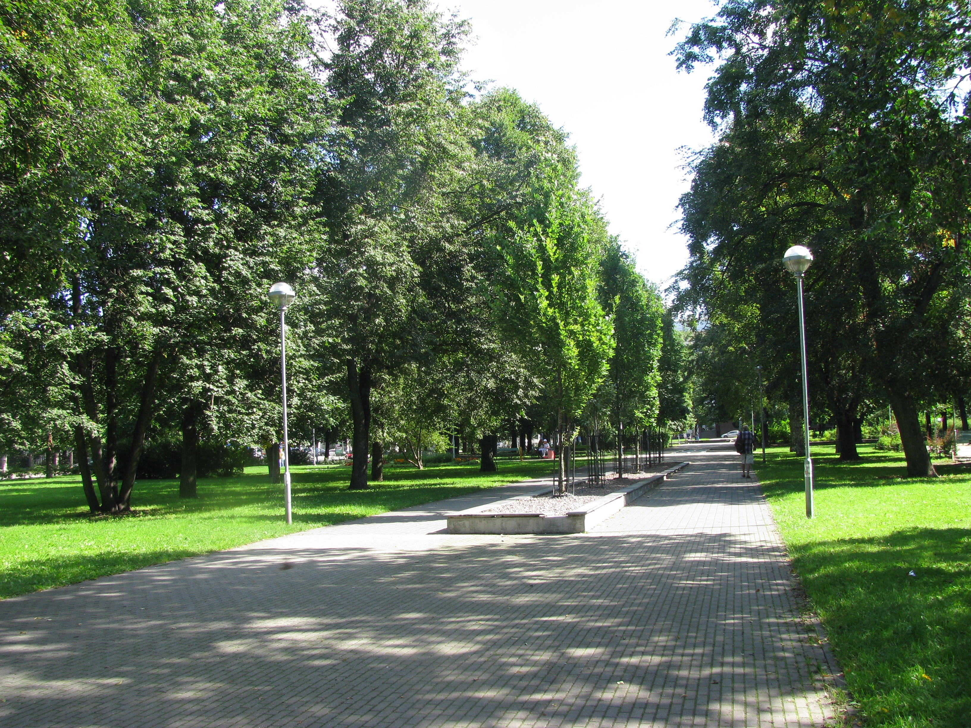 Allee Politseipargis Tallinnas Gonsiori ja Pronksi tänava ristmikul.